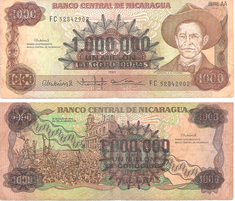 C$1 Million Córdobas showing Augusto César Sandino,Reverse-19 de Julio de 1979, dia de la liberacion,Overprinted on unissued 1,000 Cordobas(1990)